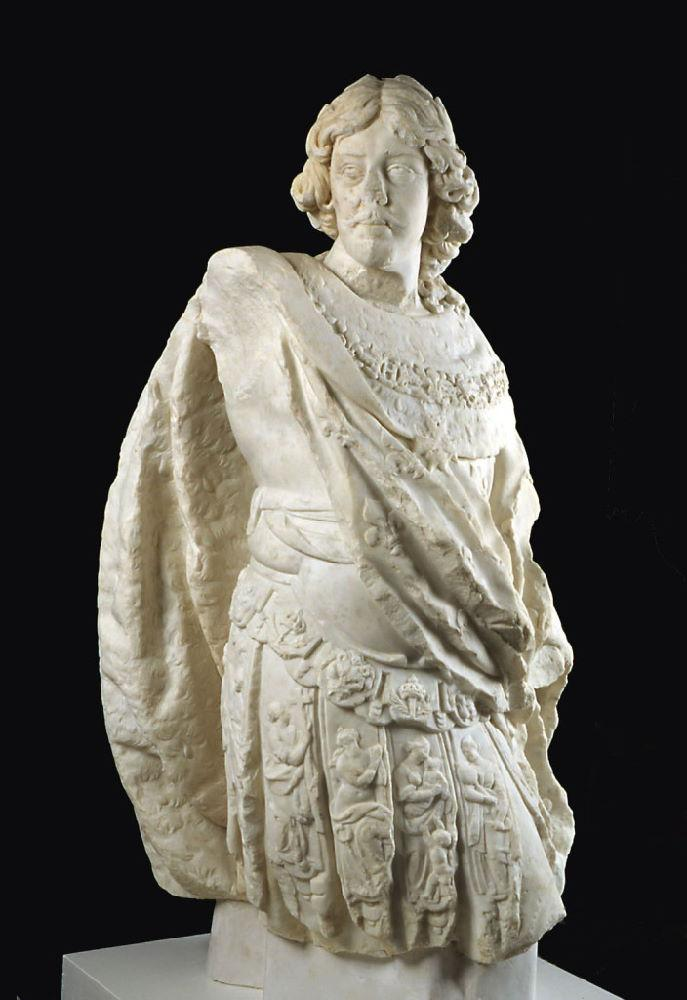 Statue de Louis XIII, Guillaume Bertelot, 1635, Musée Sainte-Croix de Poitier